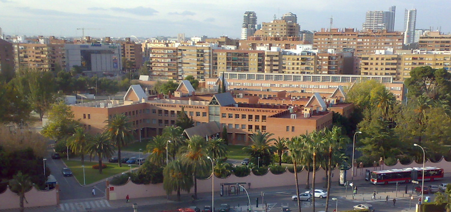 Edifici de la Conselleria d'Educació de la Generalitat Valenciana (avinguda Campanar 32, 46015 València, Espanya).